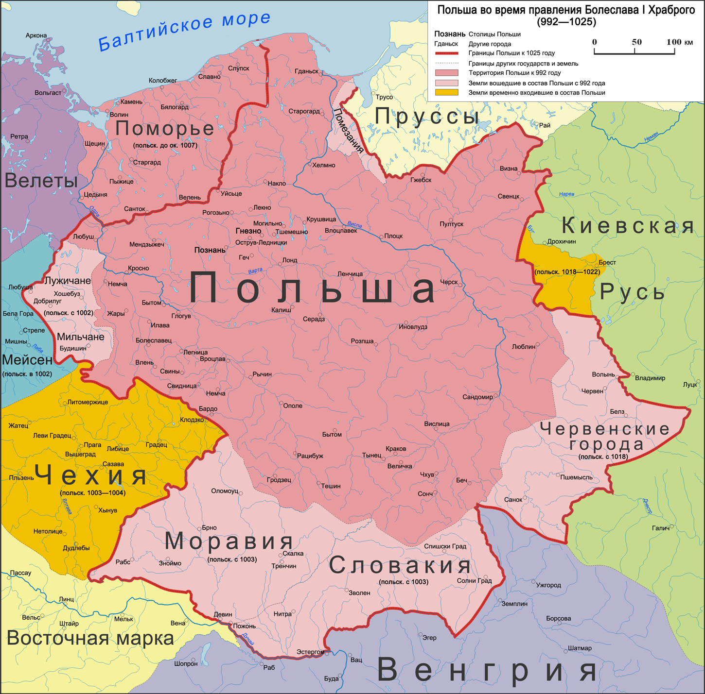 Территория Польши во время правления Болеслава I Храброго